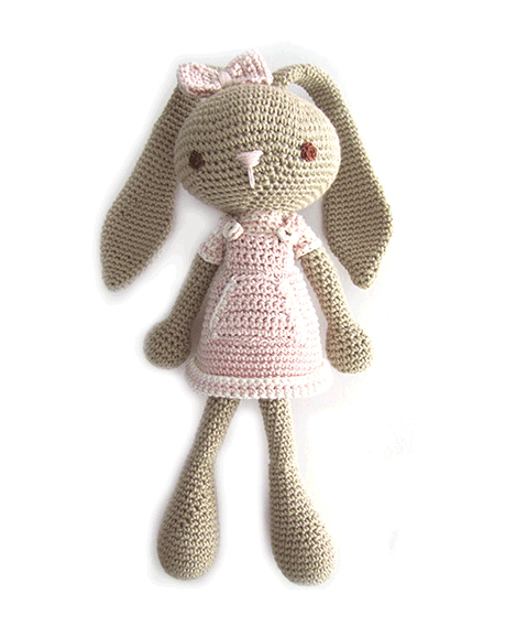 Conejita hecha con la técnica amigurumi